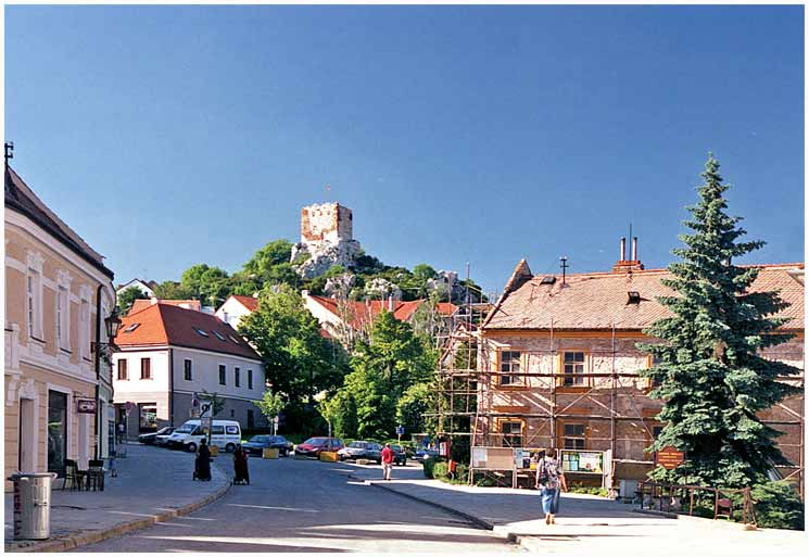 Fotografie vyhlídkové kozí věže.